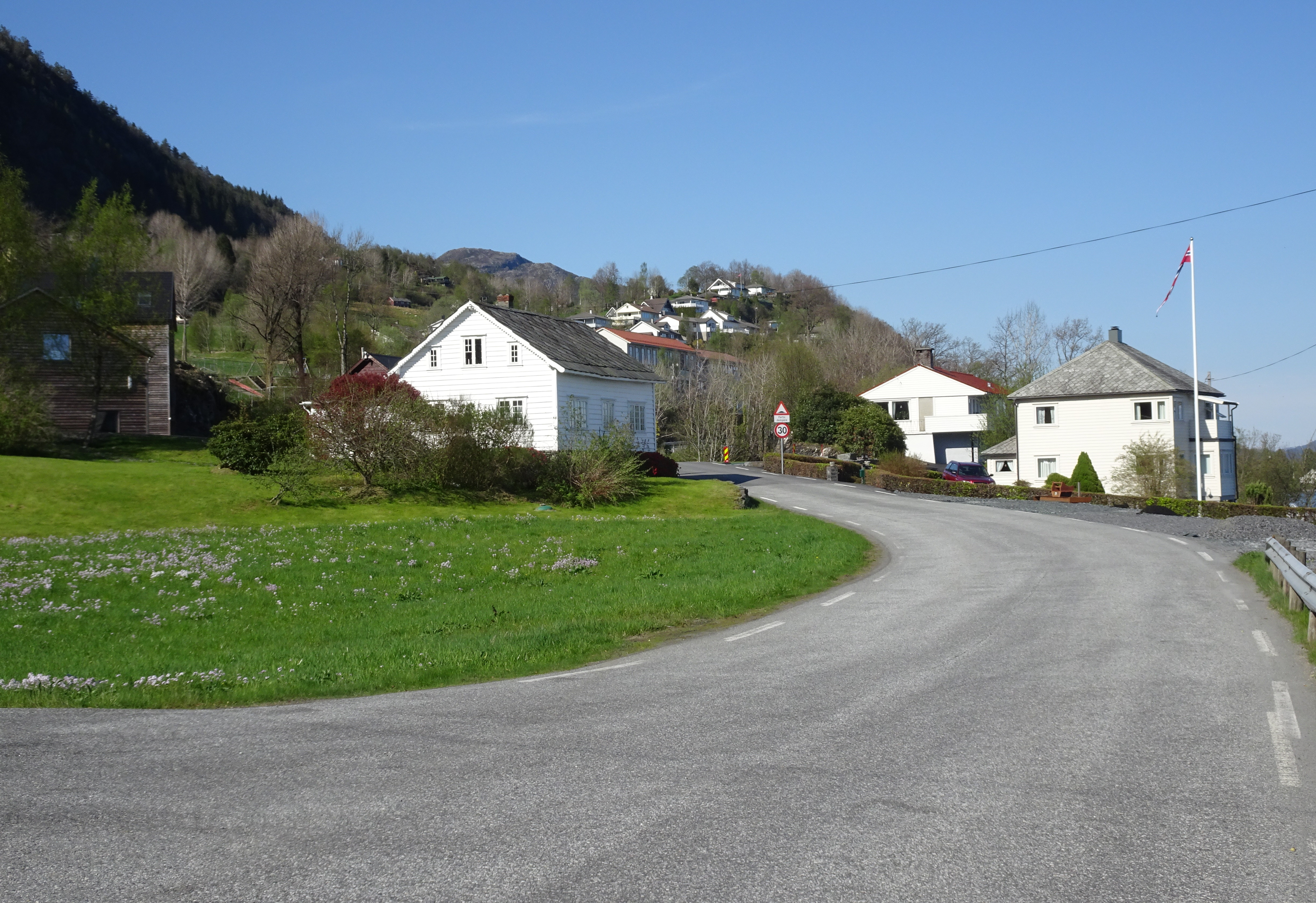 Onarheimsvegen (fylkesvei 5076, tidl. 78) i Onarheim